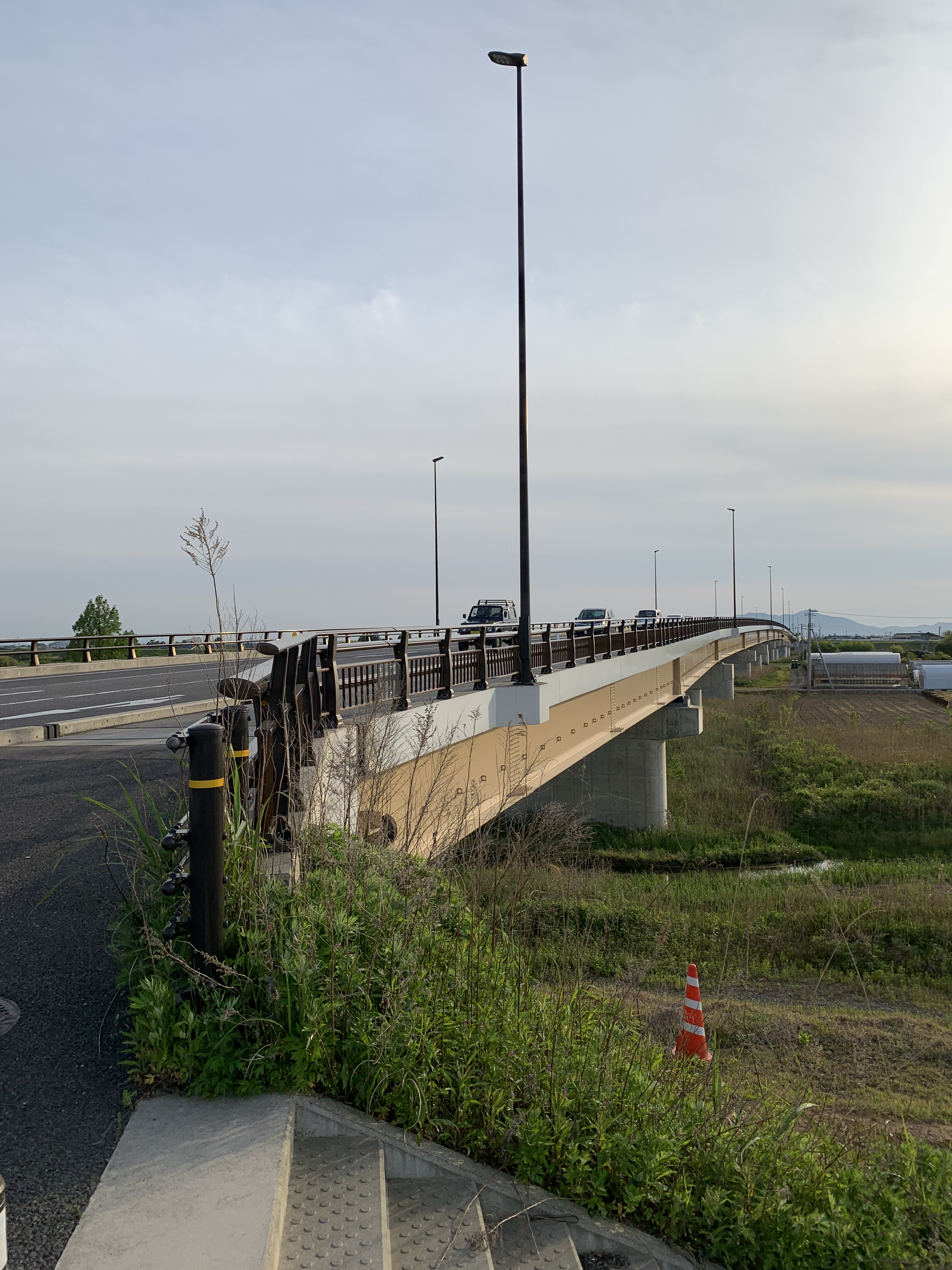 2015年（平成27年）10月に開通した臼井橋（3代目）を右岸・秋葉区側（秋葉区子成場）から撮影